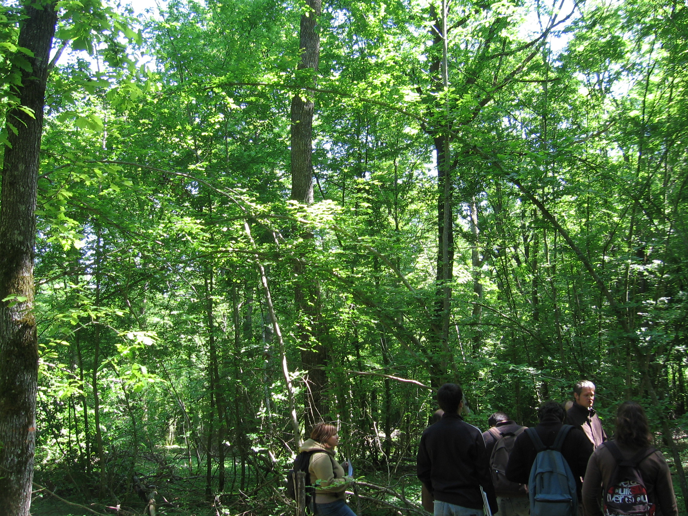 Ancien Taillis sous futaie en conversion vers la FIR (futaie irrégulière) juste après éclaircie de taillis. Nièvre printemps 2011